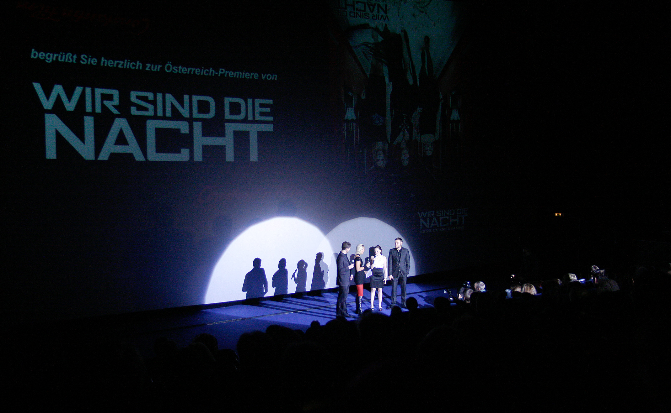 Dennis Gansel, Jennifer Ulrich und Max Riemelt bei der Österreichpremiere von Wir sind die Nacht im Apollo Kino in Wien.